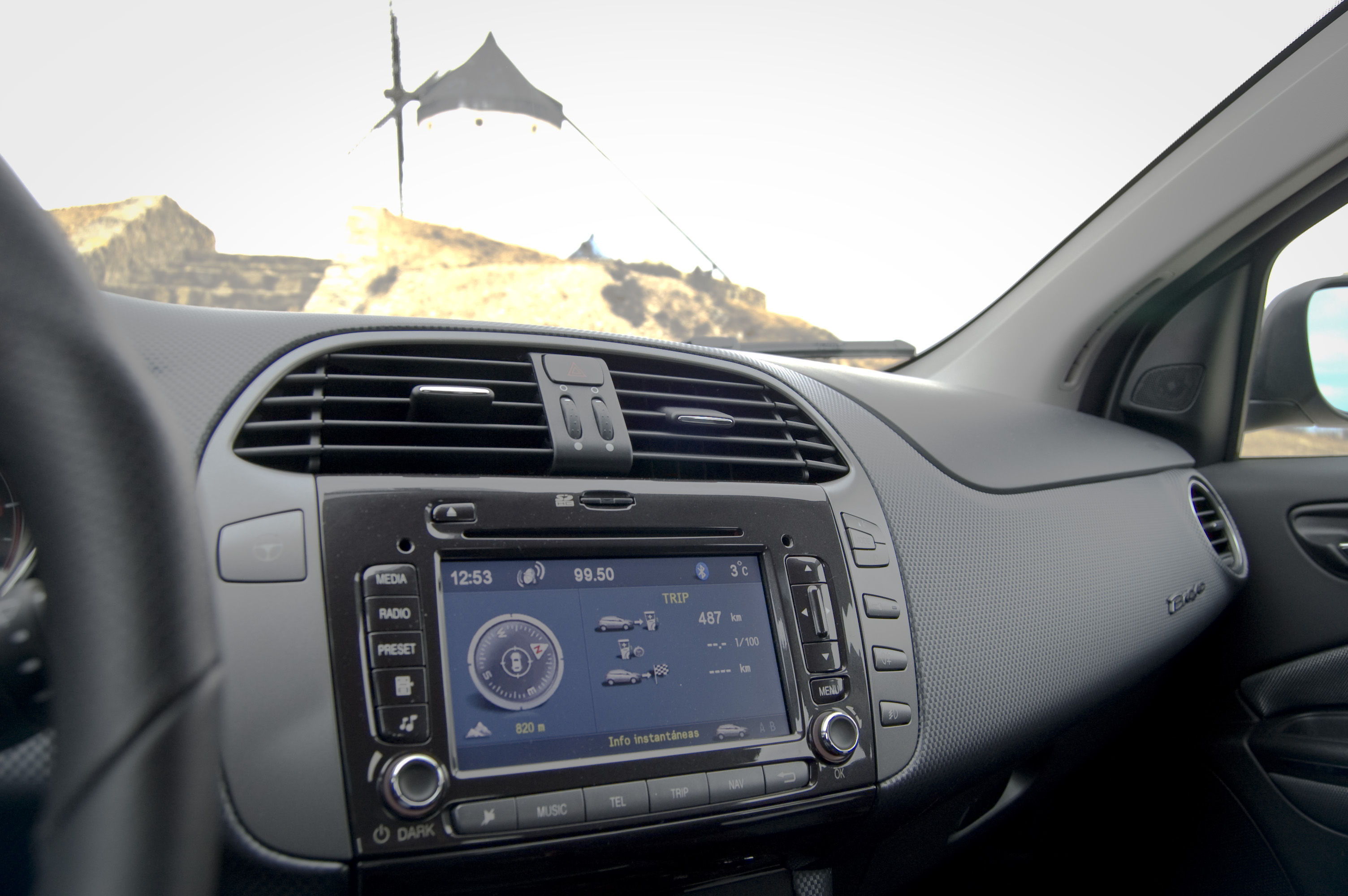 Fiat Bravo prueba y "photoshoot" en los molinos de viento de Consuegra (Toledo). Prueba en Diariomotor